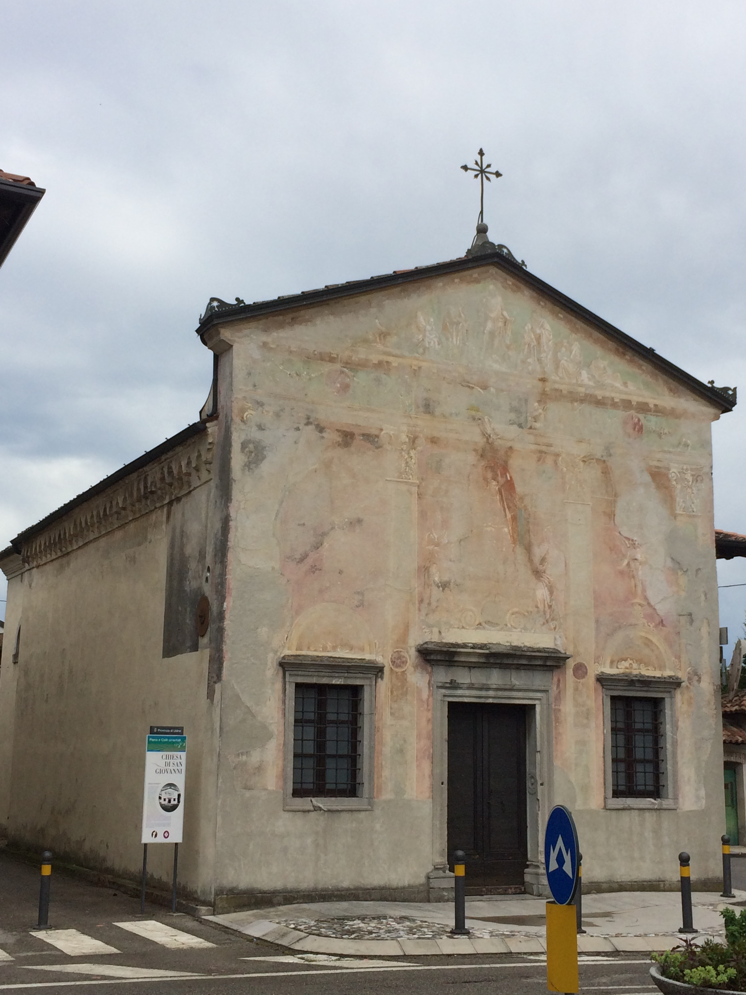 Pavia di Udine